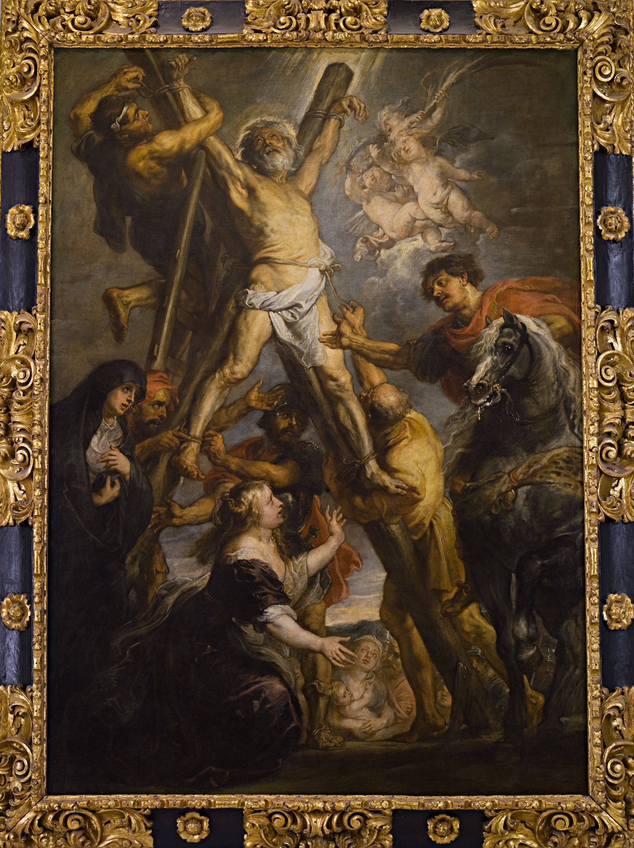 El Martirio de San Andrés c.1638-1639 Pedro Pablo Rubens fotografía: José Baztán